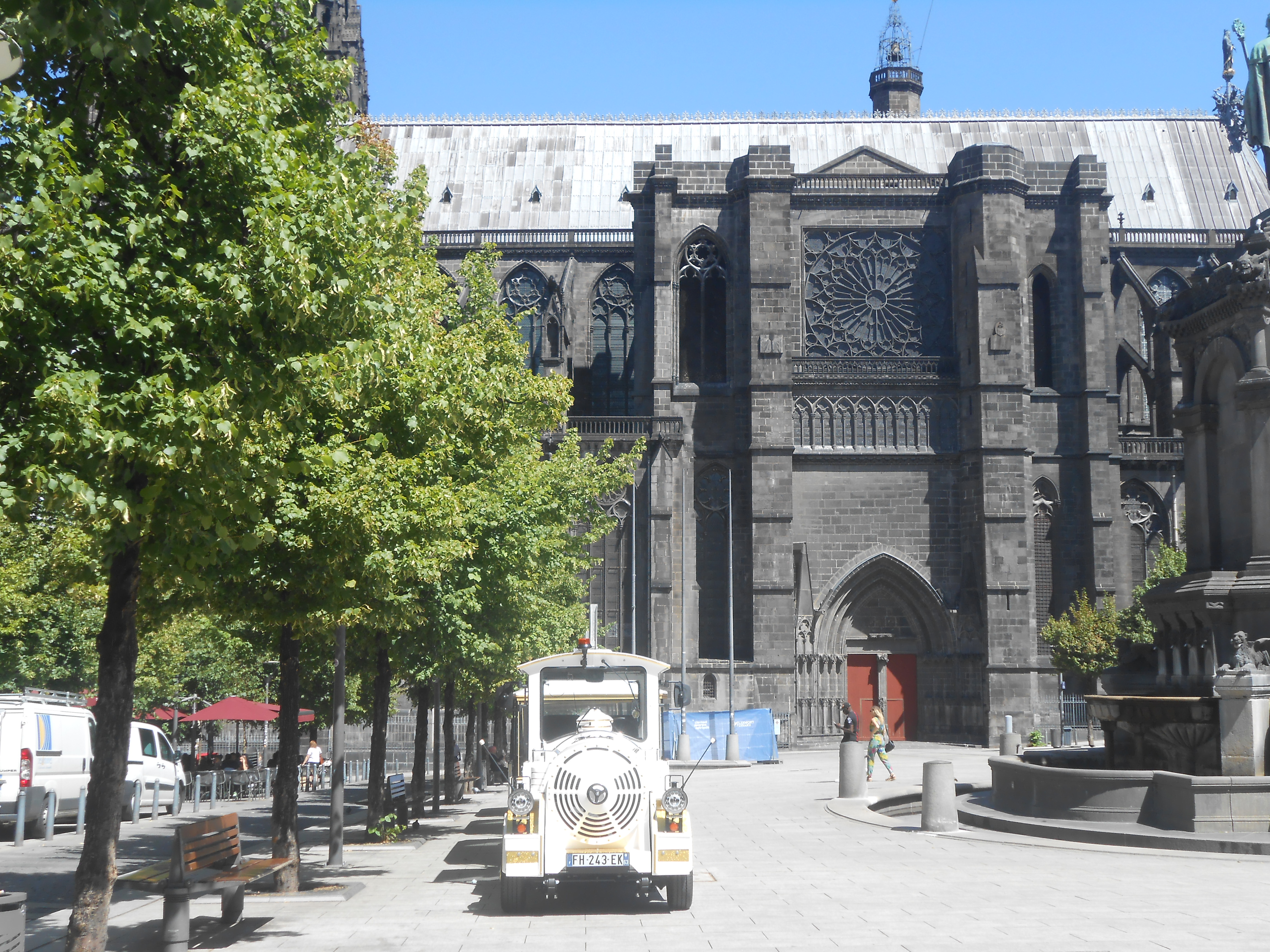 Place de la Victoire, Clermont-Ferrand, Auvergne.